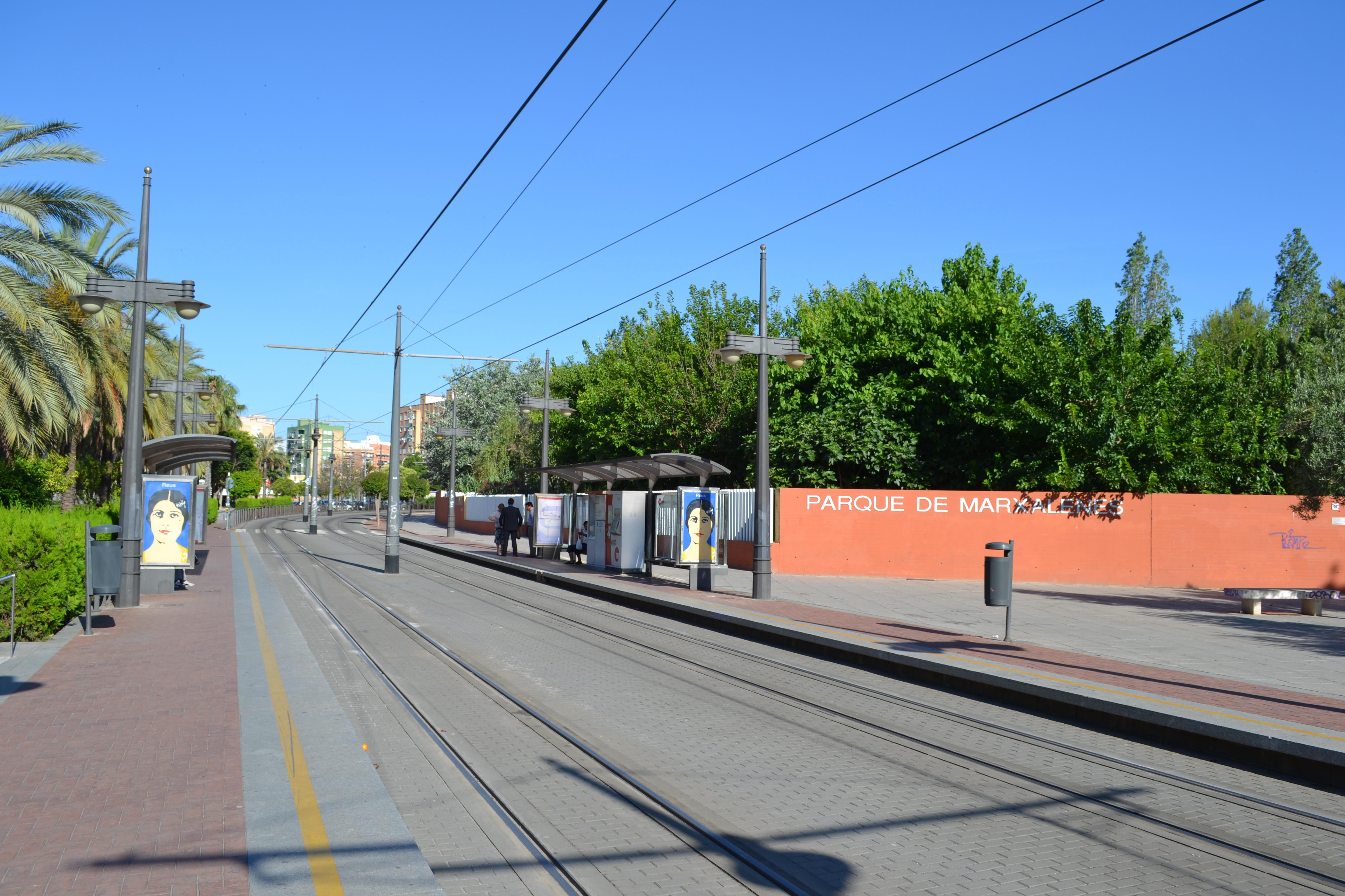 Estación de Reus (MetroValencia), en la calle del mismo nombre junto al extremo sureste del parque de Marxalenes.